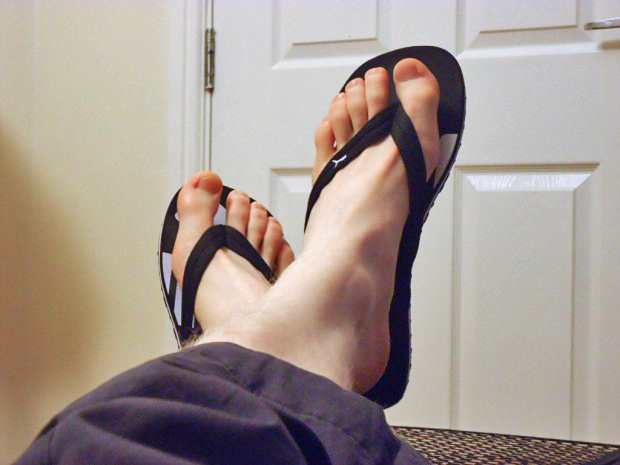 Japonki